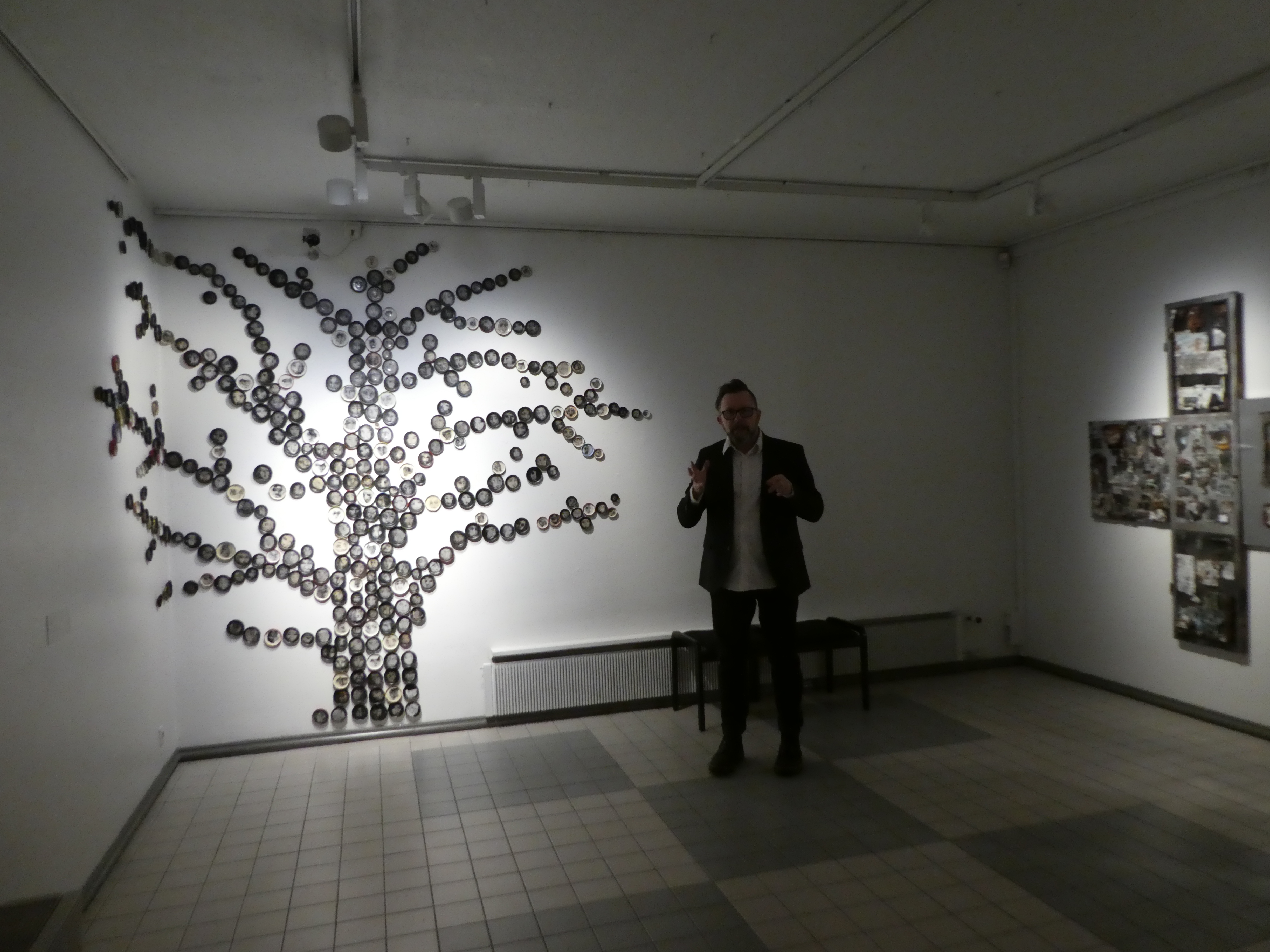 Kajaanin taidemuseo, Urho Kähkösen näyttely, tekijä itse esittelee teostaan "Sukupuu", kuivaneulagrafiikka, kaiverretuin purkinkansin ilman varsinaista painamista paperille